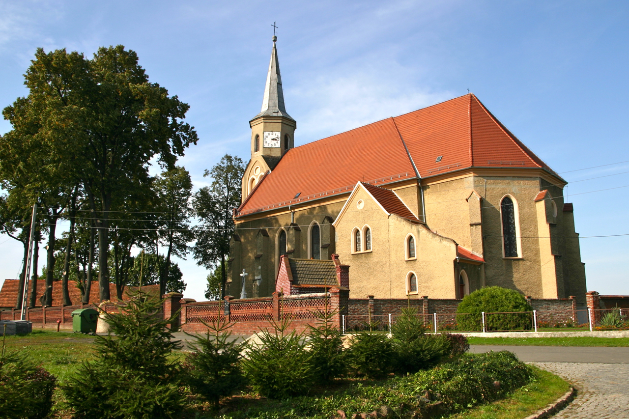 Kolnowice (dodatkowa nazwa w j. niem. Kohlsdorf) - wieś w Polsce położona w województwie opolskim, w powiecie prudnickim, w gminie Biała.